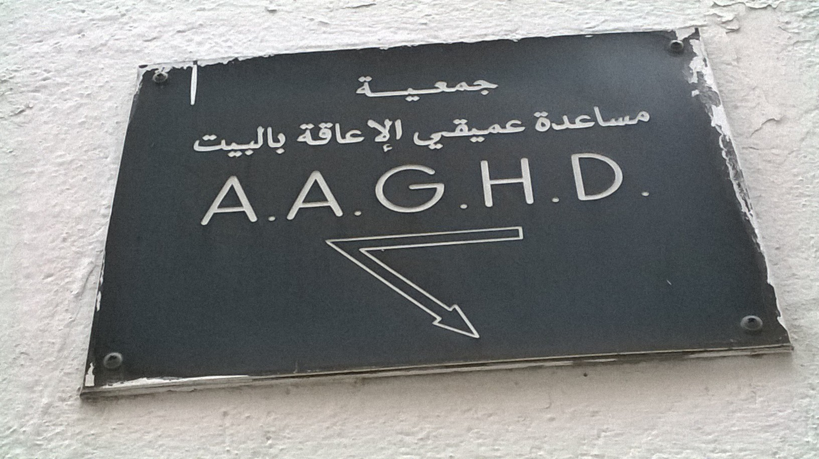 La médina de Tunis مدينة تونس العتيقة